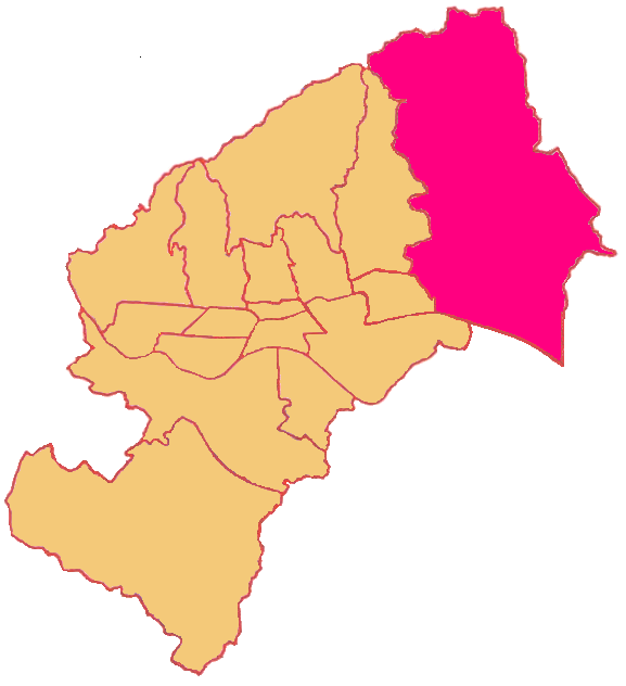 Map of Sesvete District in Zagreb (Gradska četvrt Sesvete)